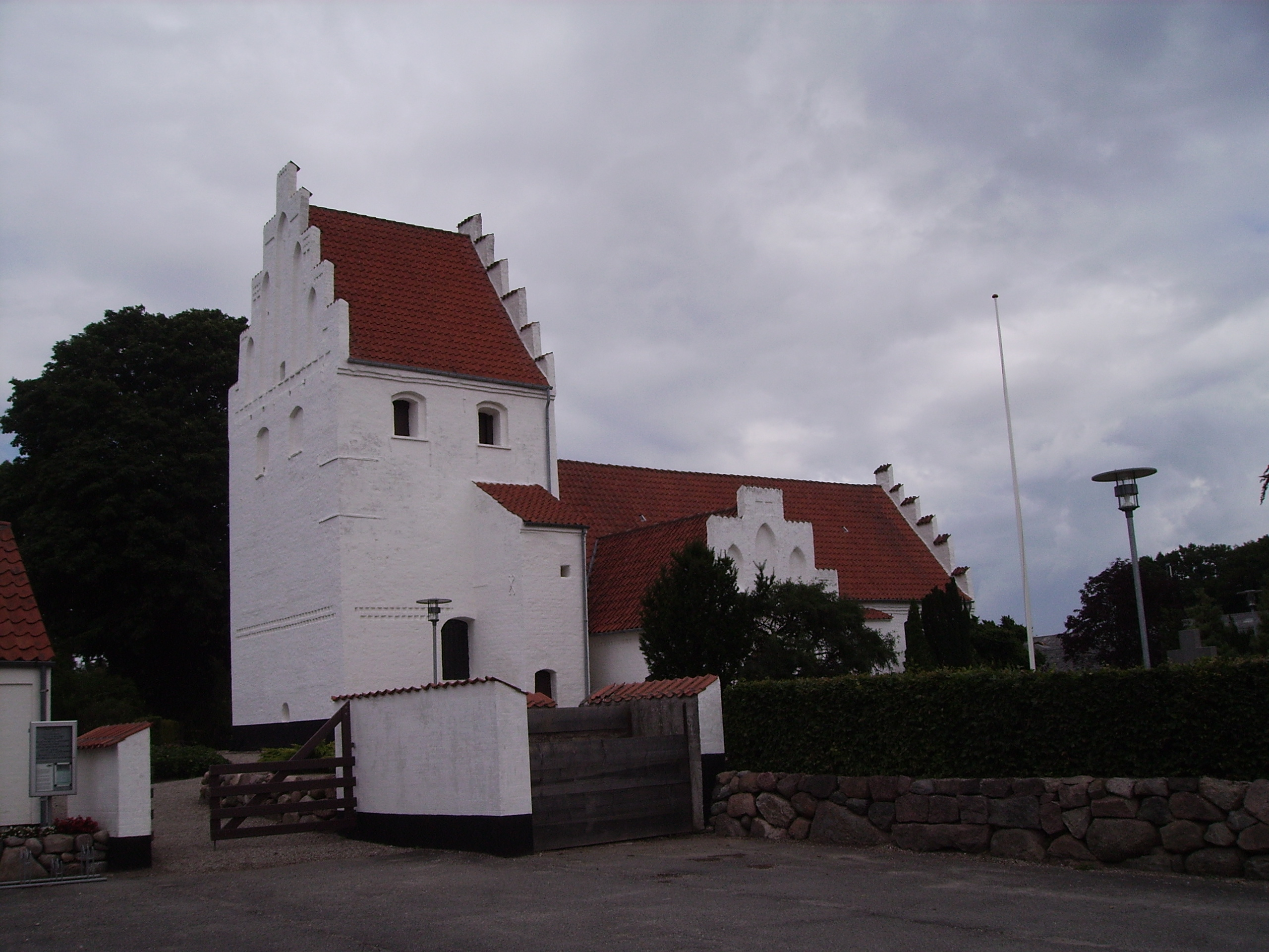 Allesø Kirke, Allesø Sogn, Lunde Herred, Odense Amt, Denmark (Danish Church) - Allesø Kirke fra sydvest